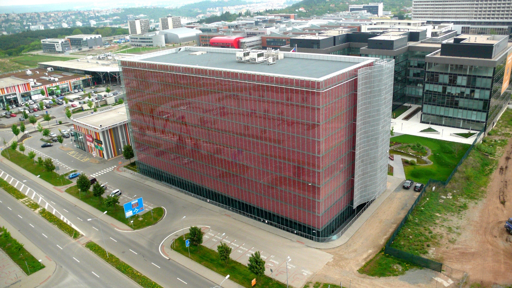 Moravský zemský archiv - pohled zeshora